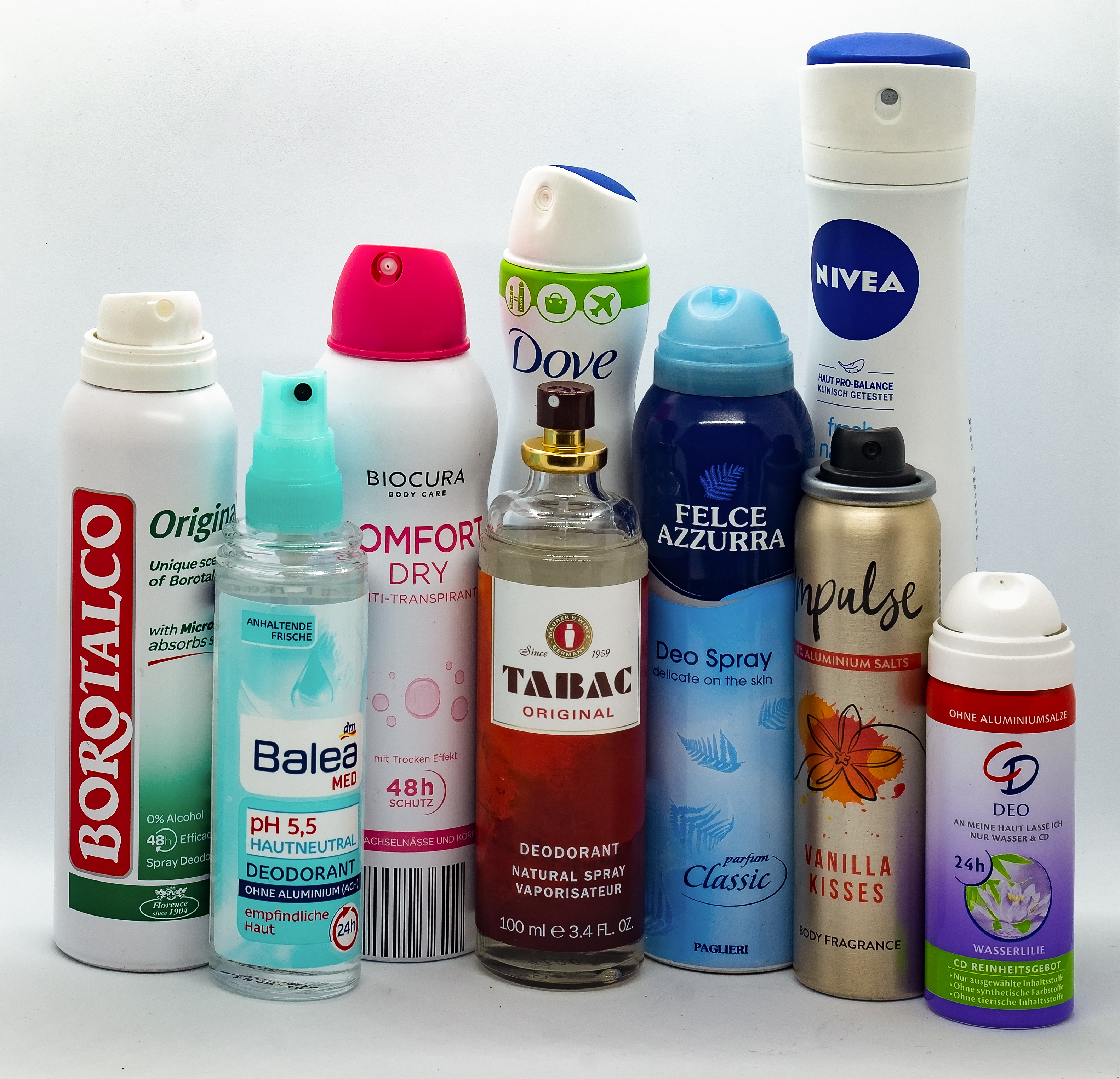 Deosprays